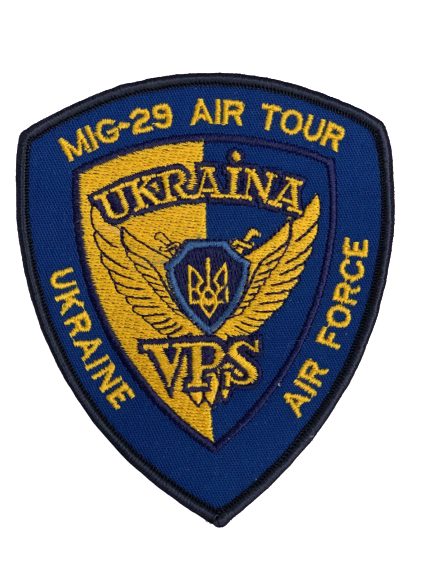 Патч делегатів туру МіГ-29 ВПС України до США та Канади 1992 року